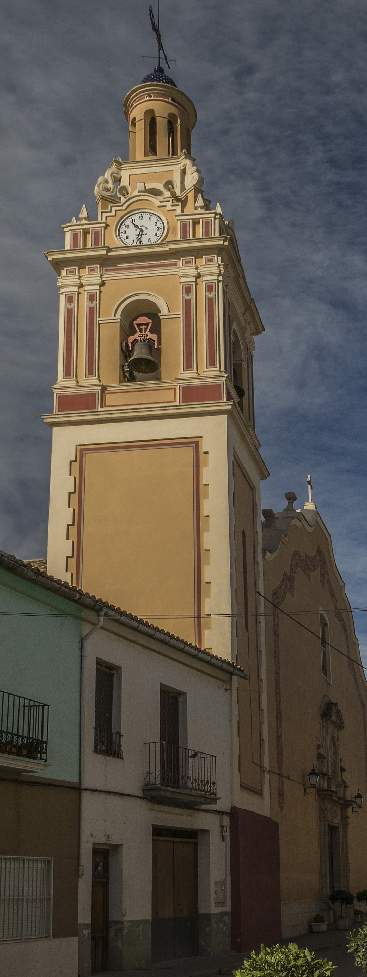 Polinyà de Xúquer és un municipi del País Valencià situat a la comarca de la Ribera Baixa.